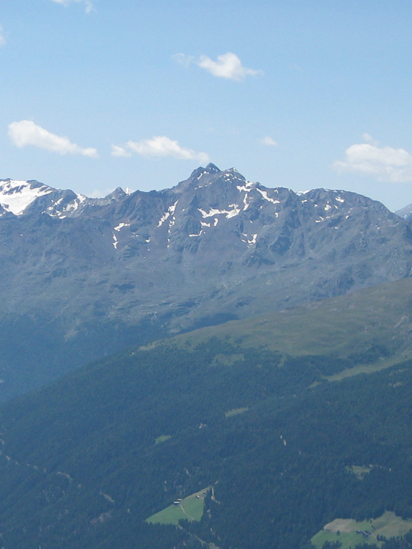 Zufrittspitze von der Ultner Hochwart (von Osten) gesehen, Ausschnitt aus File:Blick Richtung Westen von der Ultner Hochwart.jpg